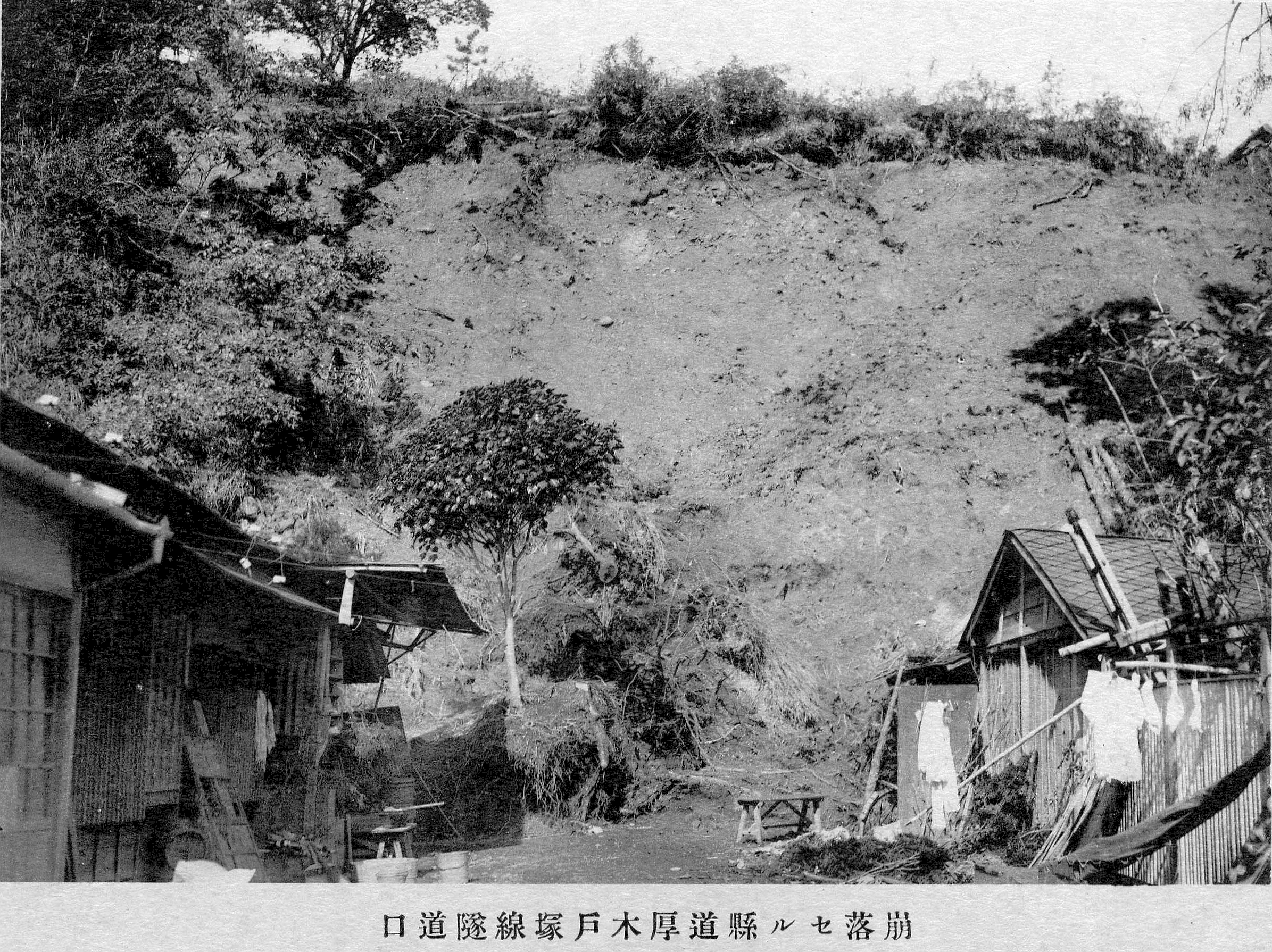 関東大震災で崩壊した、神奈川県道厚木戸塚線隧道口（矢沢隧道）。現在の神奈川県道22号横浜伊勢原線、サクラス戸塚付近。